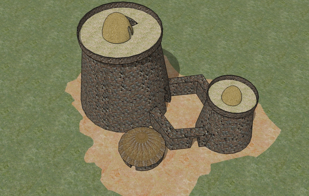 Nuraghe S. Barbara - Villanova Truschedu (Oristano) Restituzione architettonica - modello sketchup 3D